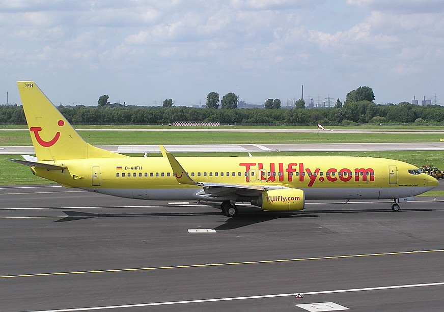 TUIFly Boeing 737-800